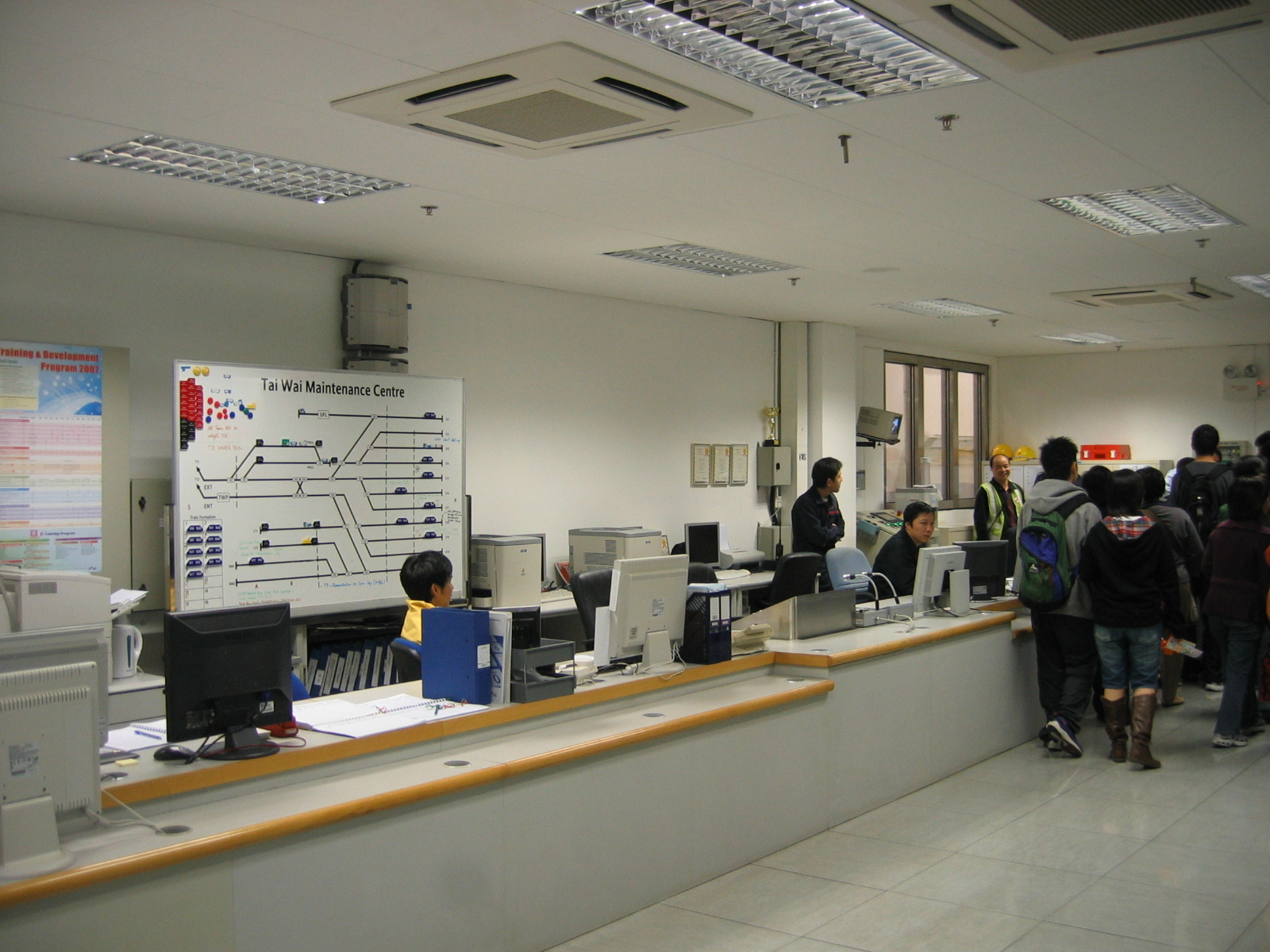 Tai Wai Maintenance Centre Control Room 大圍車廠